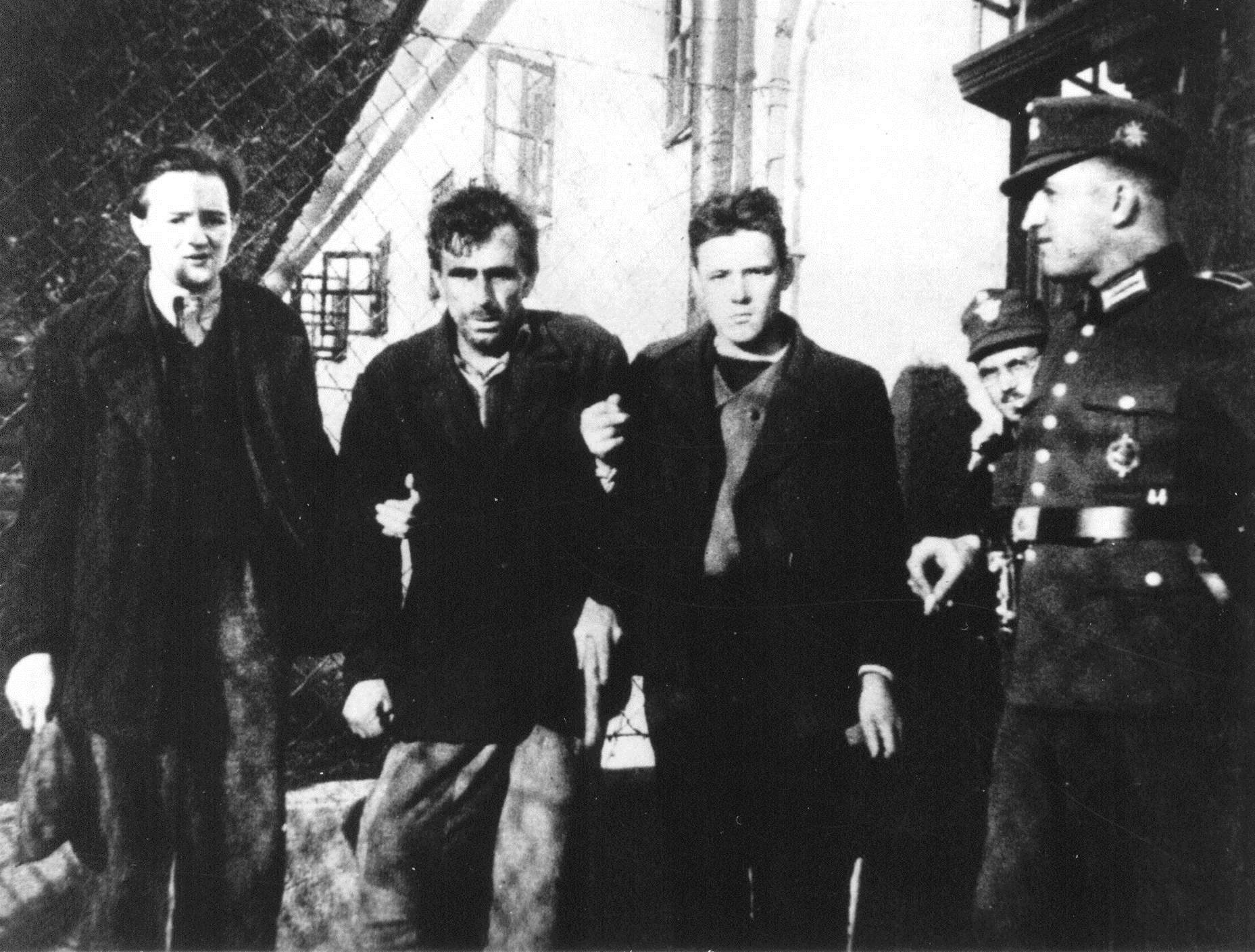 Zaporniki na dvorišču zapora v Begunjah leta 1941.